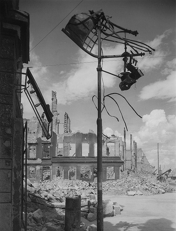 Original image description from the Deutsche FotothekDresden. Fahrleitungsmast mit daran hängendem Bettgestell, durch die Explosionswelle zerstört und herausgeschleutert. Kreuzung Ammonstraße/Falkenstraße